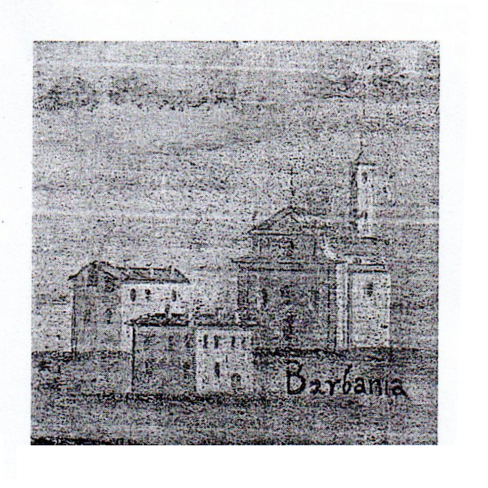 Porzione di un affresco presente all'Archivio Vescovile di Ivrea, che raffigura le parrocchie della diocesi